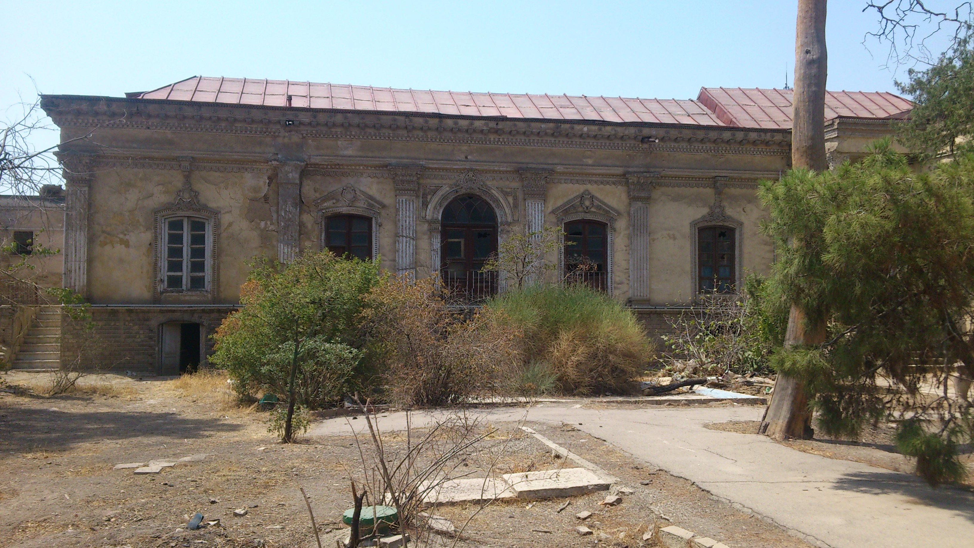 خانه اتحادیه (پایگاه انتقال خون)